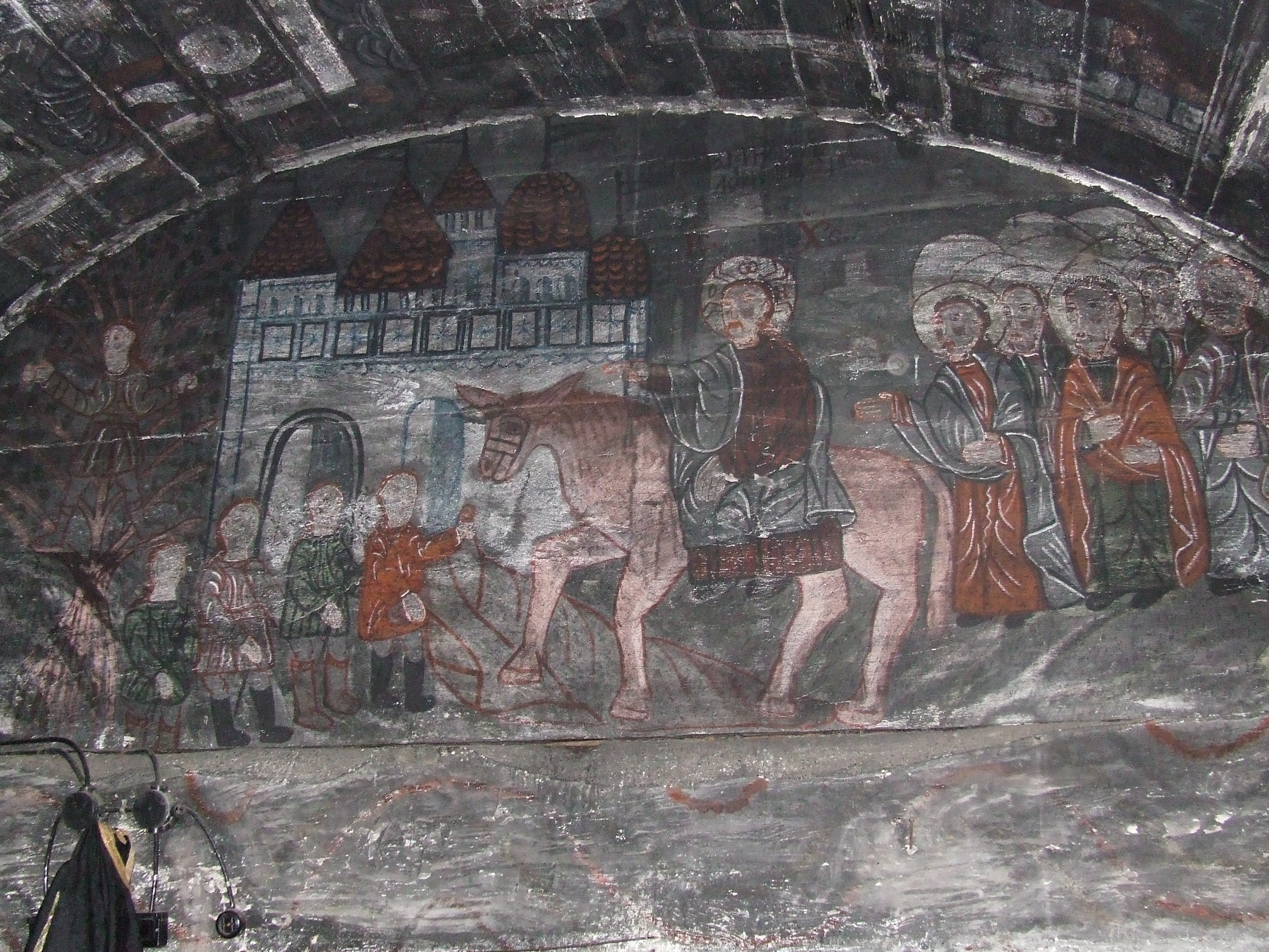 Biserica de lemn din Sânpaul. ntrarea Domnului în Ierusalim, pictură din altar.